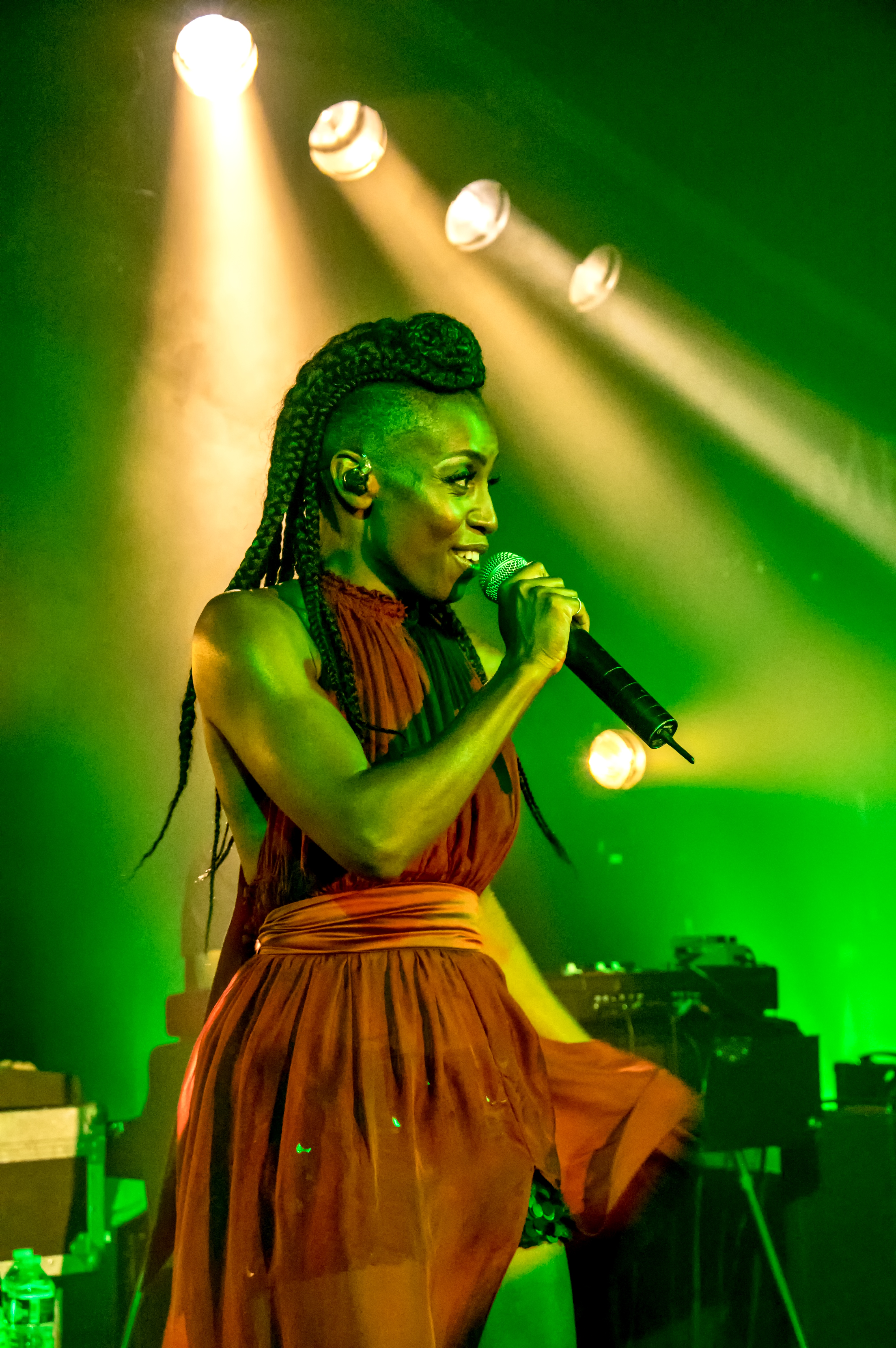 Bilder vom Zelt Musik Festival 2018 in Freiburg im Breisgau Morcheeba Auftritt am 31. Juli 2018 im Speigelzelt